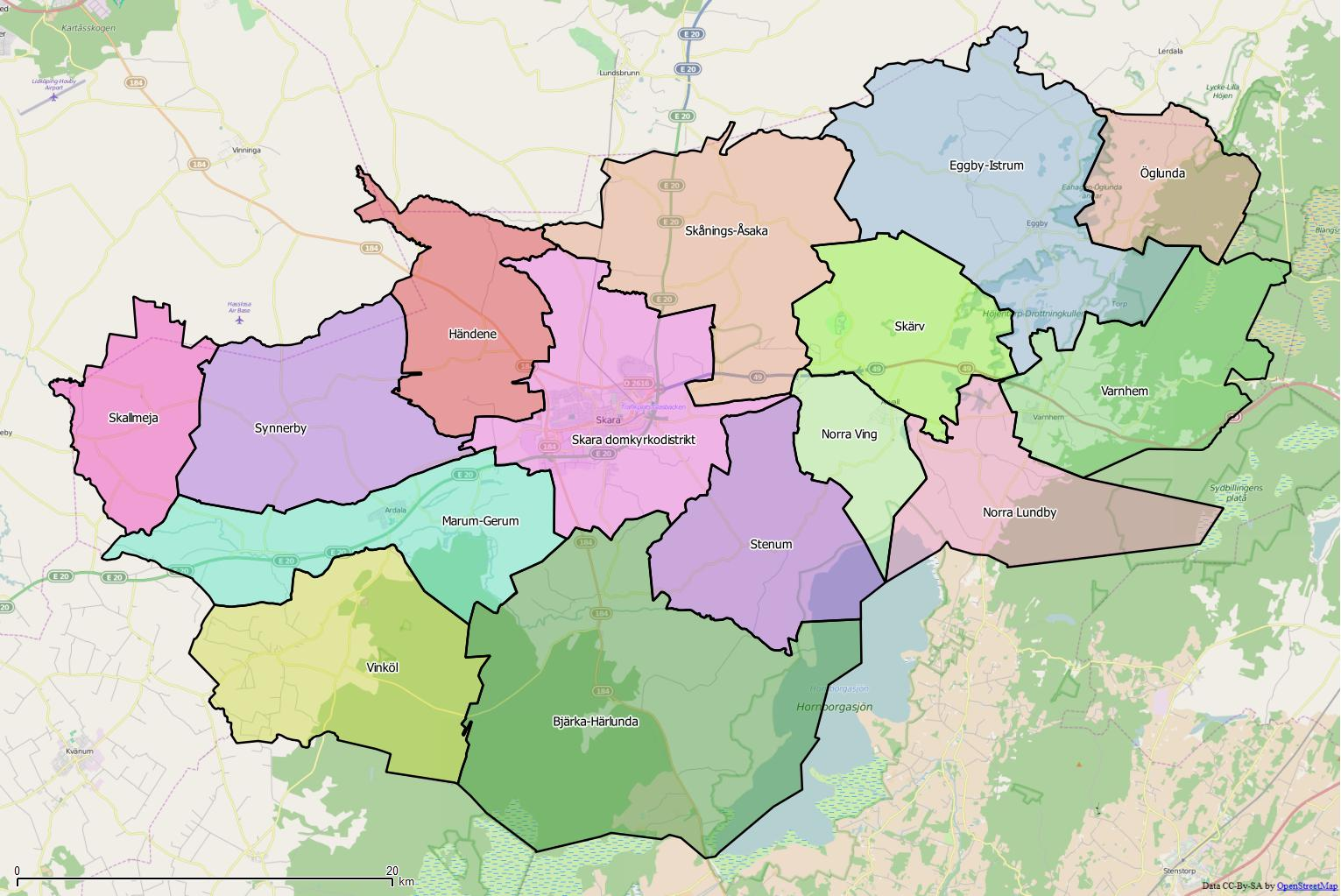 Distriktsindelningen i Skara kommun World file: 46.67761900909936656 0 0 -46.67761900909936656 1463694.19833754911087453 8070912.44817777816206217